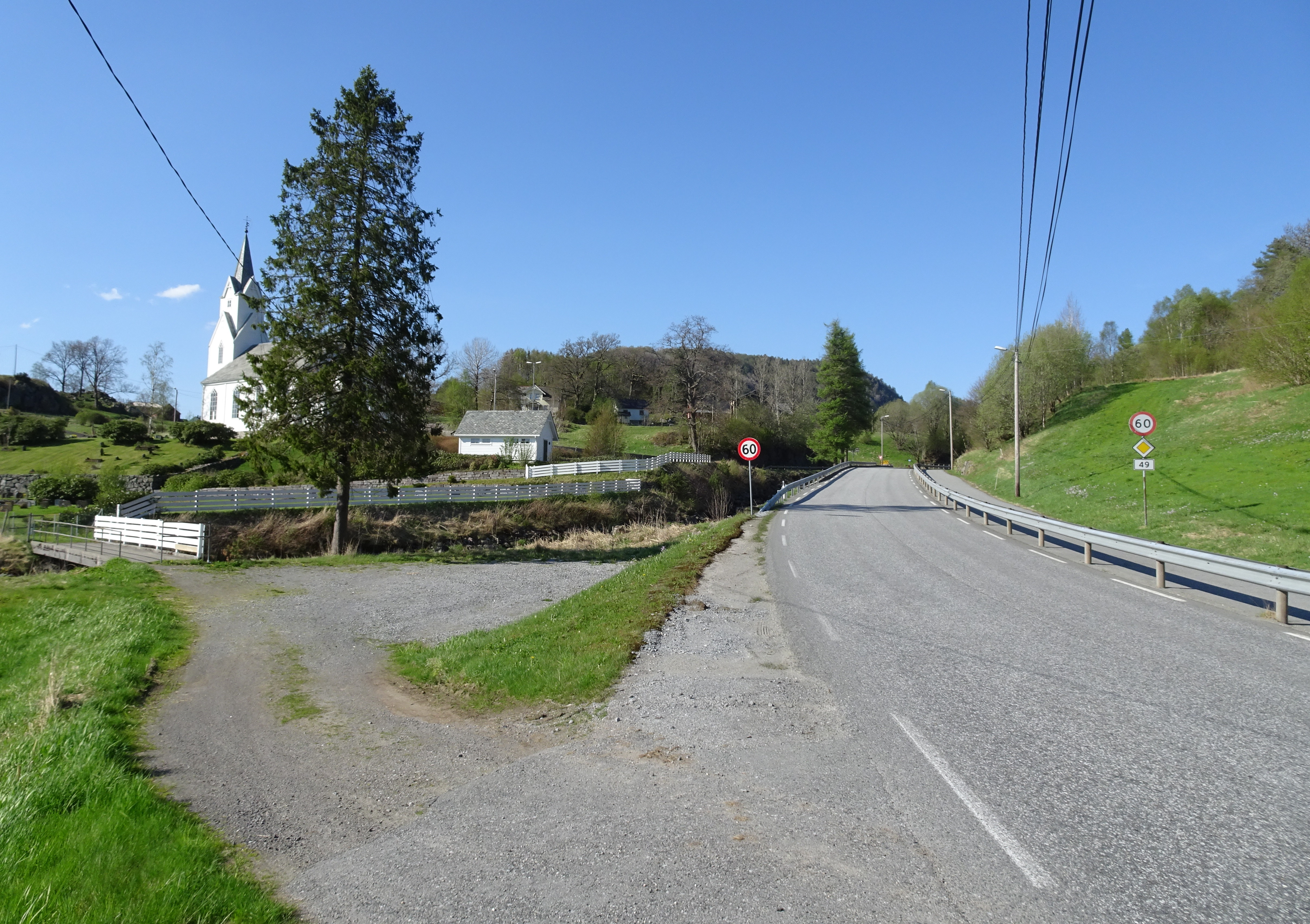 Hollekjevegen (primær fylkesvei 549, tidl. 49) nordover forbi Uggdal kirke